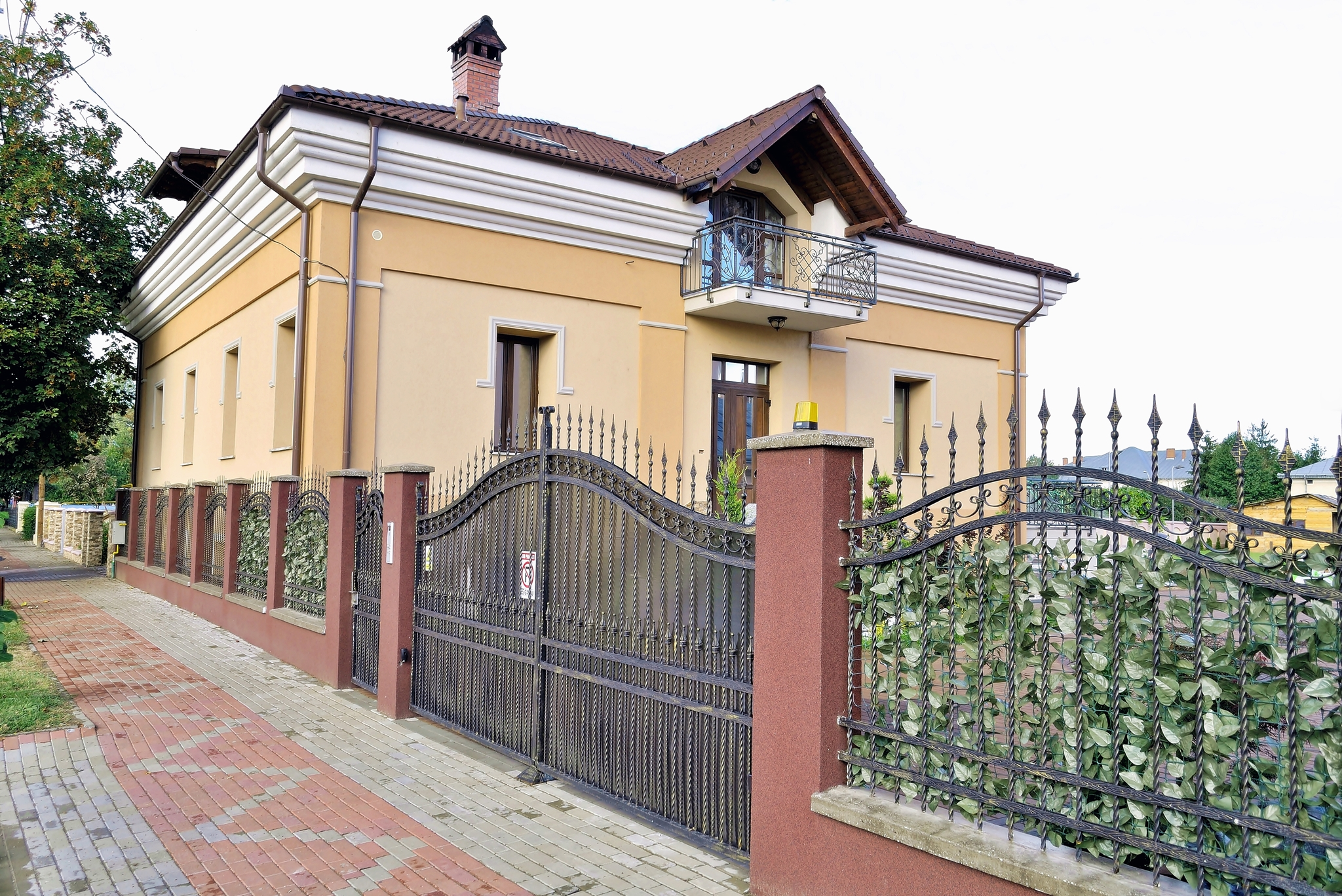 Casă,datata la 1891,str.Stefan cel Mare 238, Roman, Neamt, Romania.Una din cele mai vechi clădiri din oras Roman,acum restaurată. La un moment dat, a adăpostit un han, iar în Primul Război Mondial a fost spital militar.